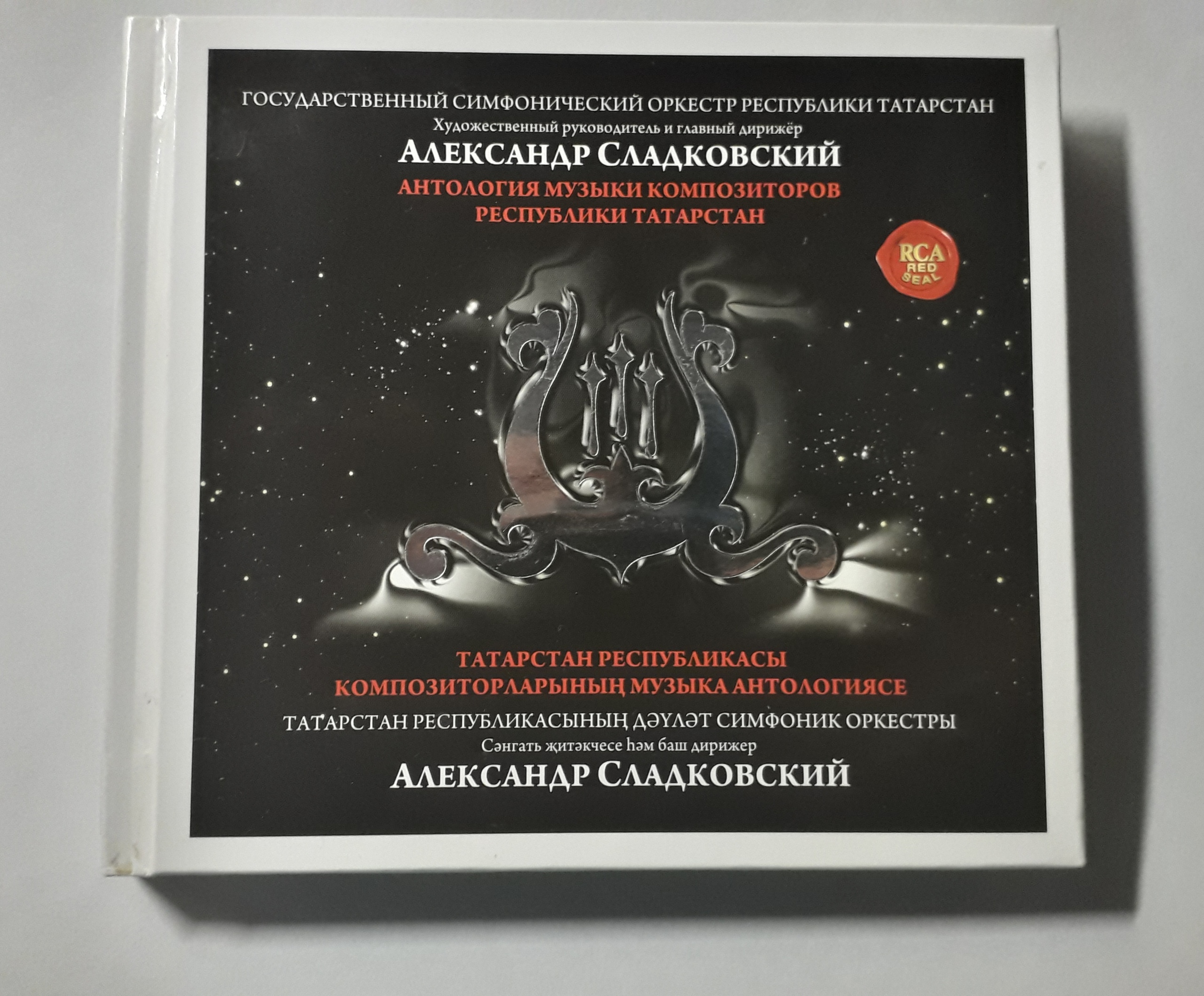 Татарча/tatarça: А.Сладковский тарафыннан төзелгән татар симфоник музыкасы җыентыгы